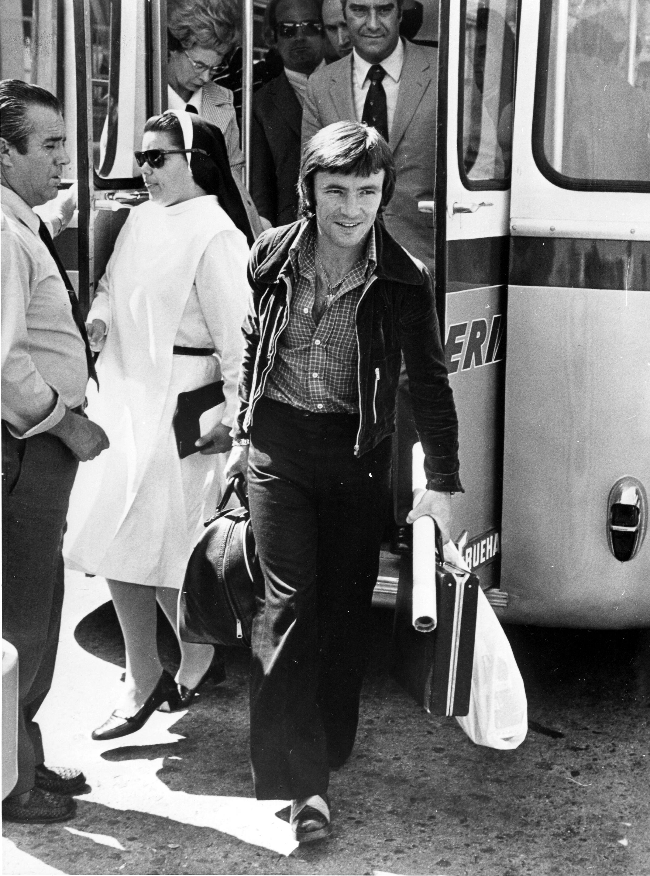 Ángel Nieto, campeón de motociclismo, a su llegada al aeropuerto de Madrid-Barajas procedente de Finlandia. Allí había participado y conquistado el segundo lugar del Gran Premio en 125cc